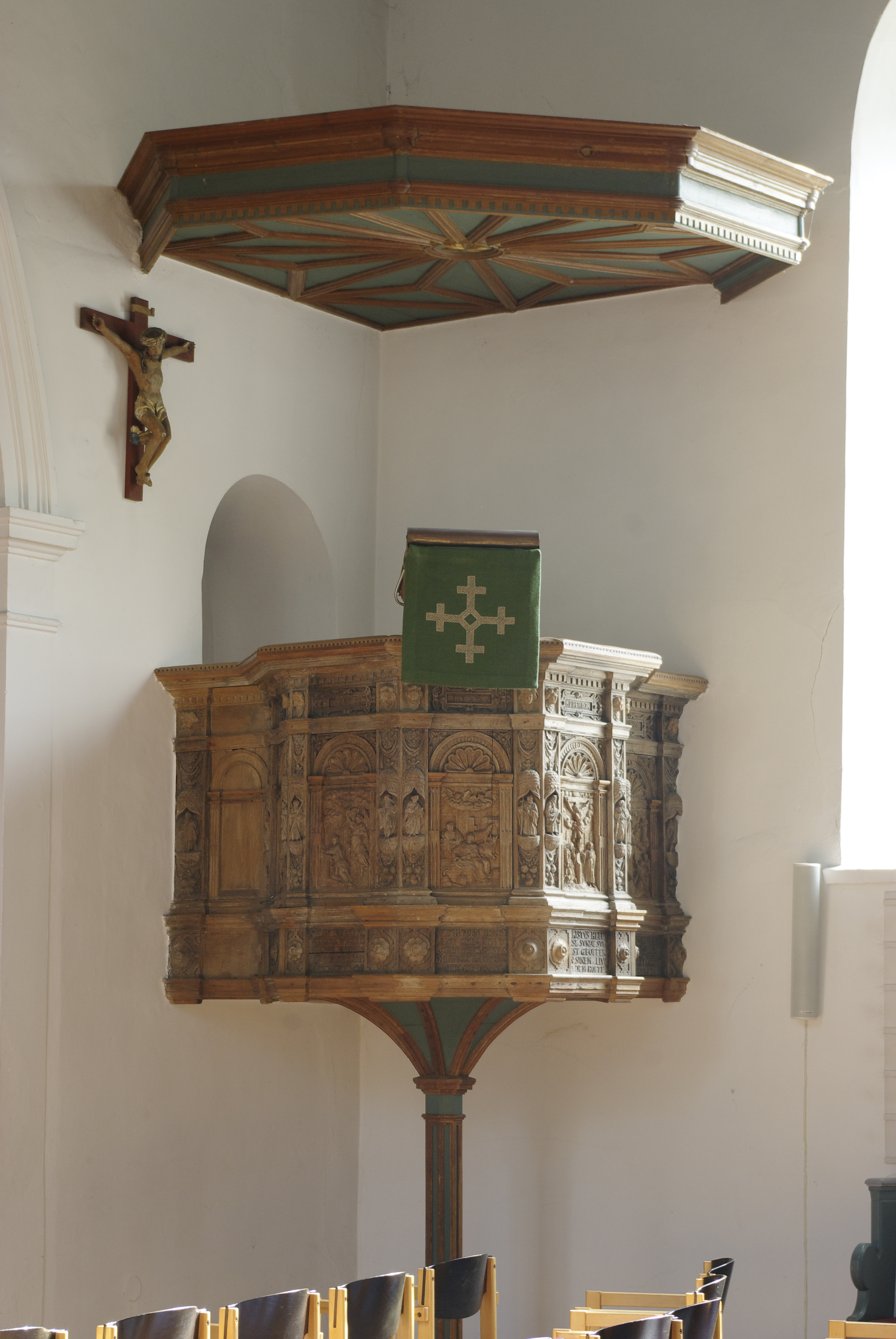 Kulturdenkmale in Friedrichstadt Nummer 19 Zähler 1